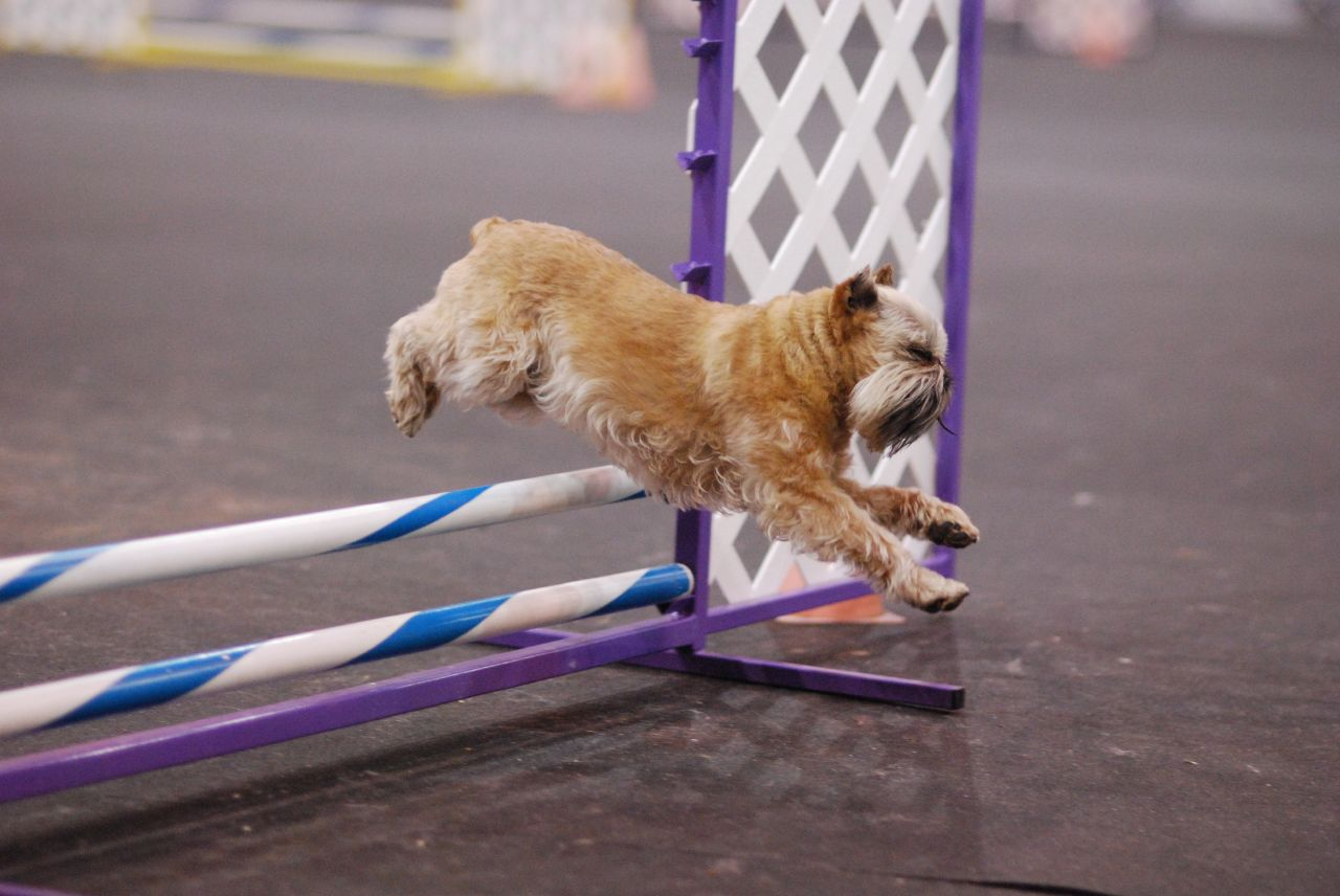 Belgian Griffon